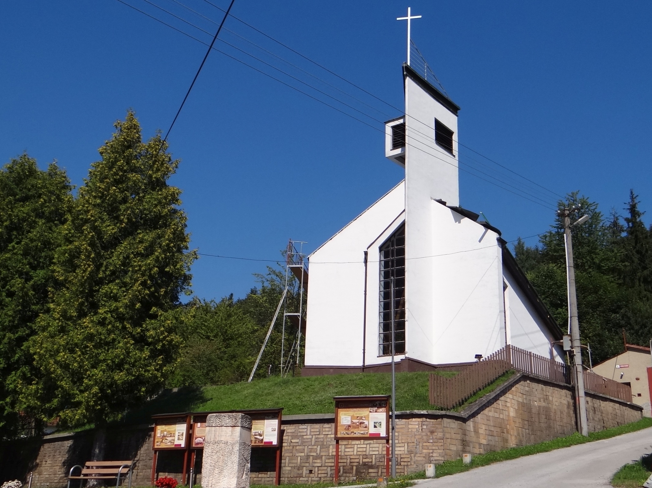 Baláže